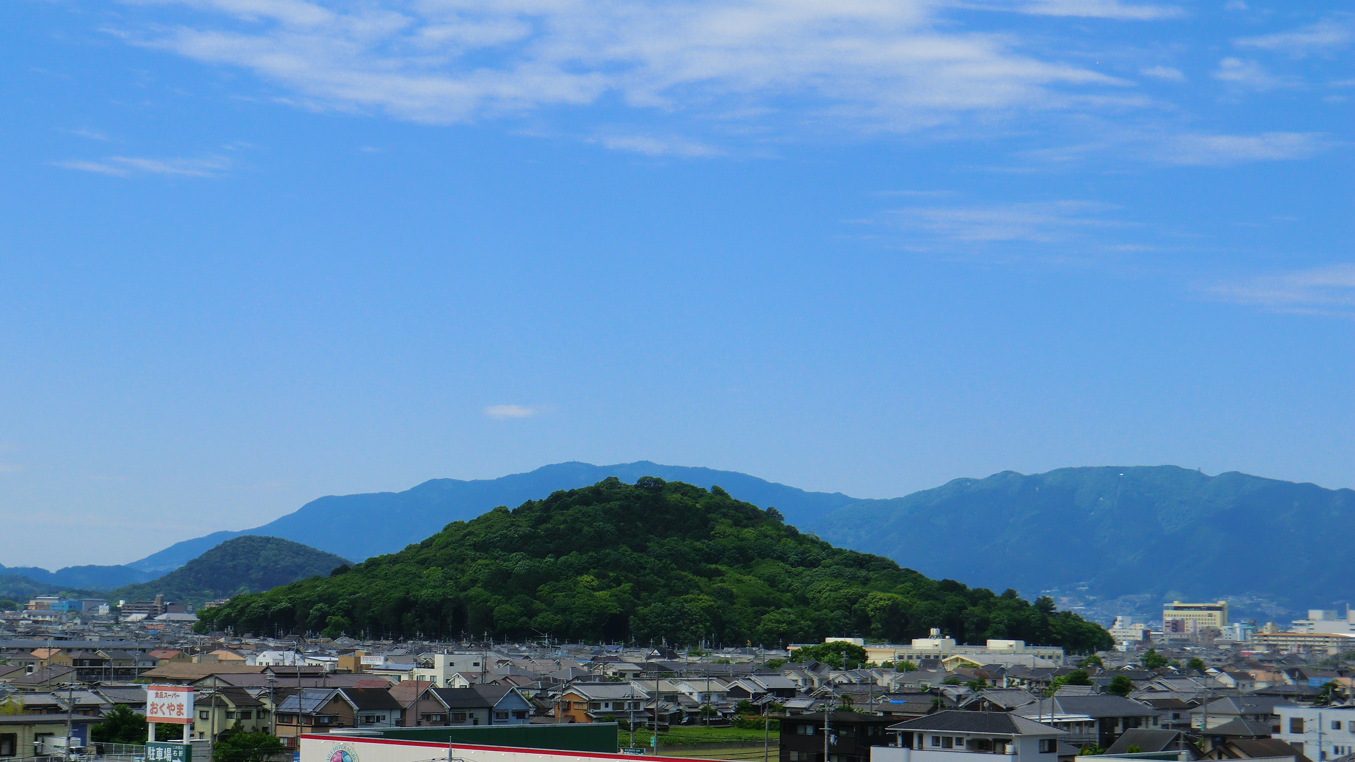 奈良県橿原総合庁舎屋上庭園から望む耳成山。 (その後方には金剛山、左後方は畝傍山、右後方は葛城山。)